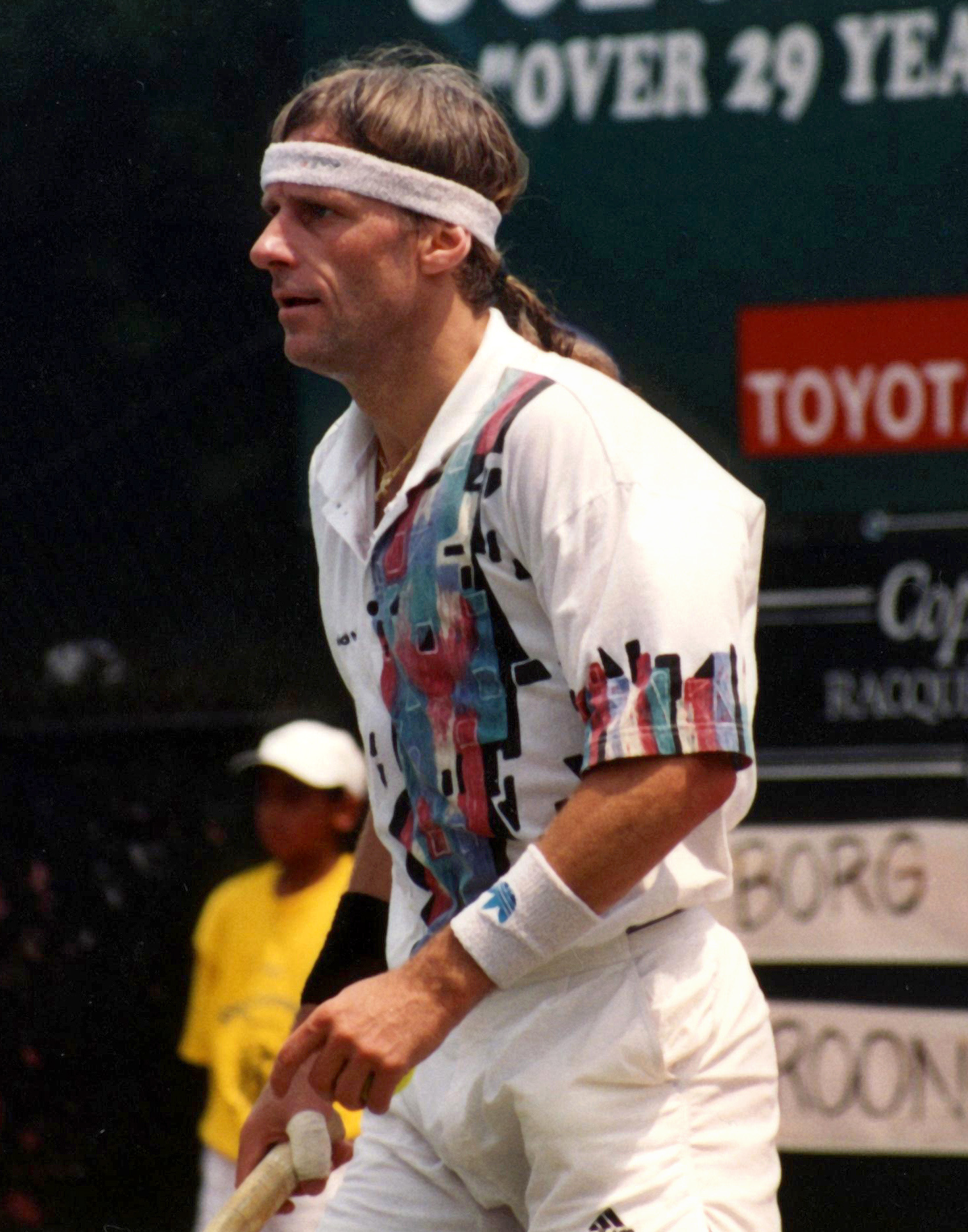 Bjorn Borg